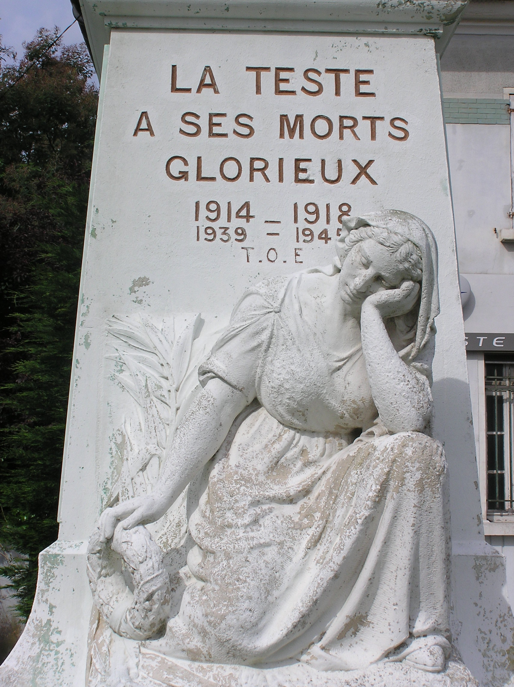 La Teste en Gironde La pleureuse du monument aux morts